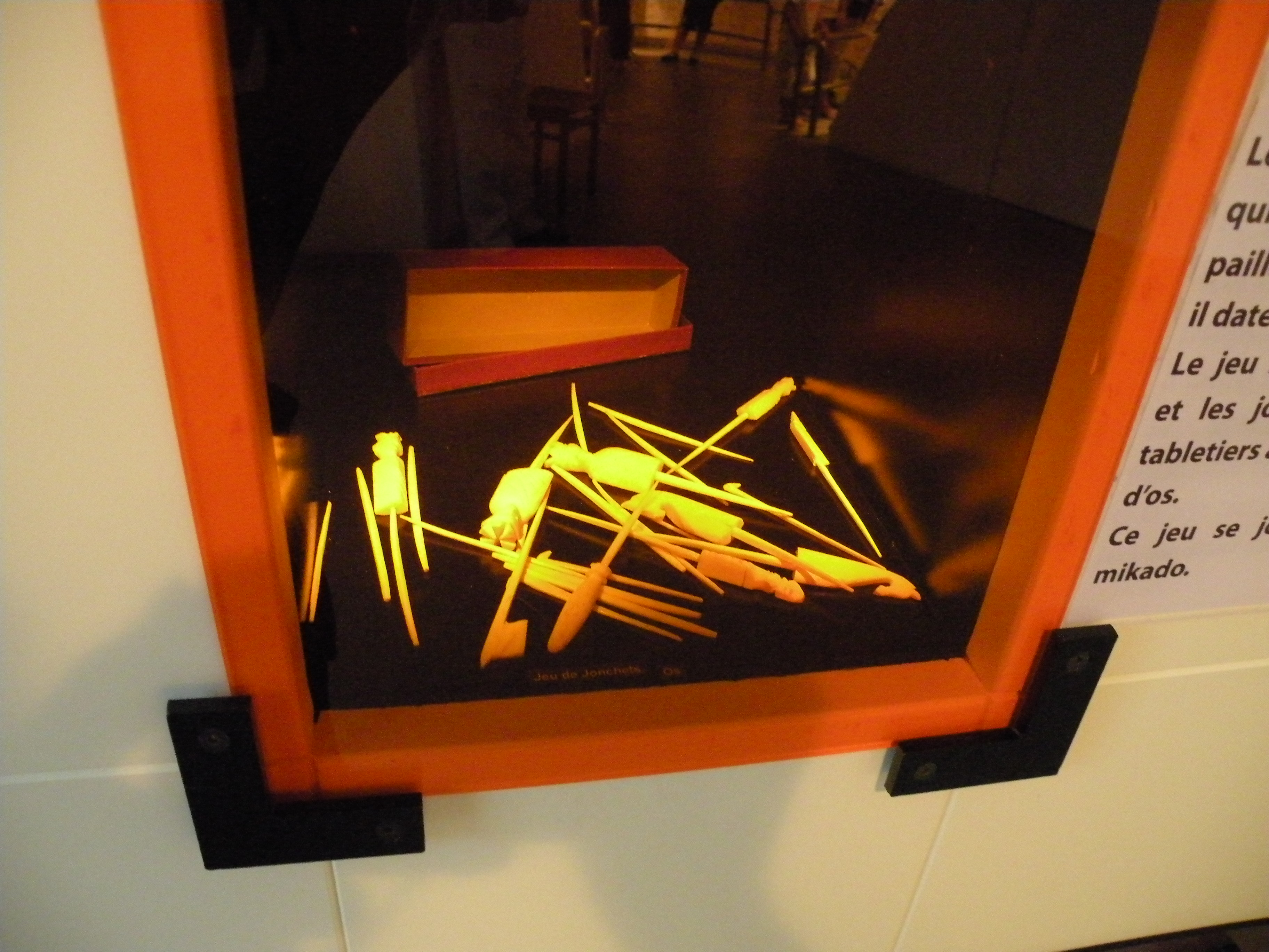 jeu de jonchet en os